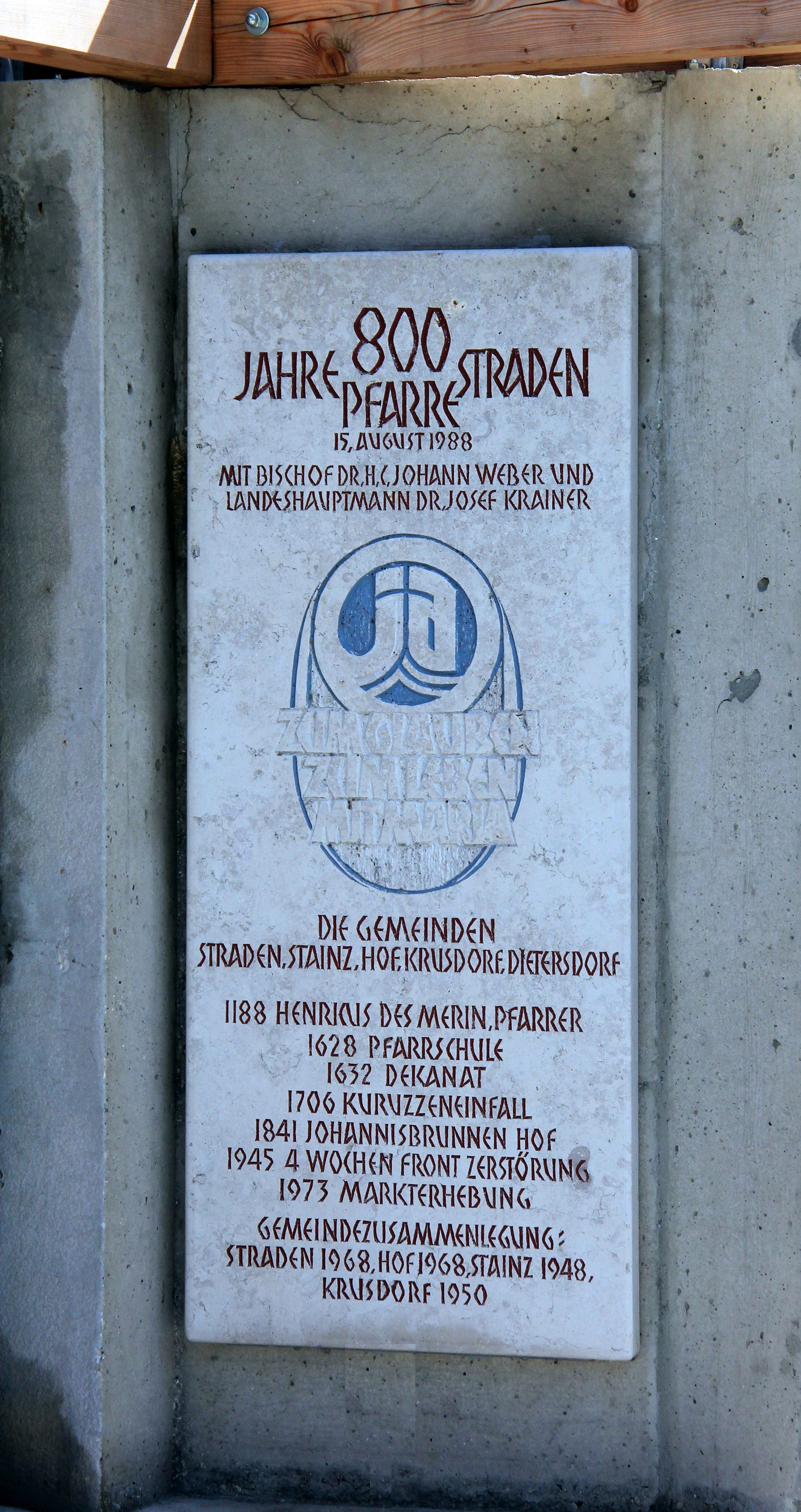 Eindrücke aus Straden, Südoststeiermark